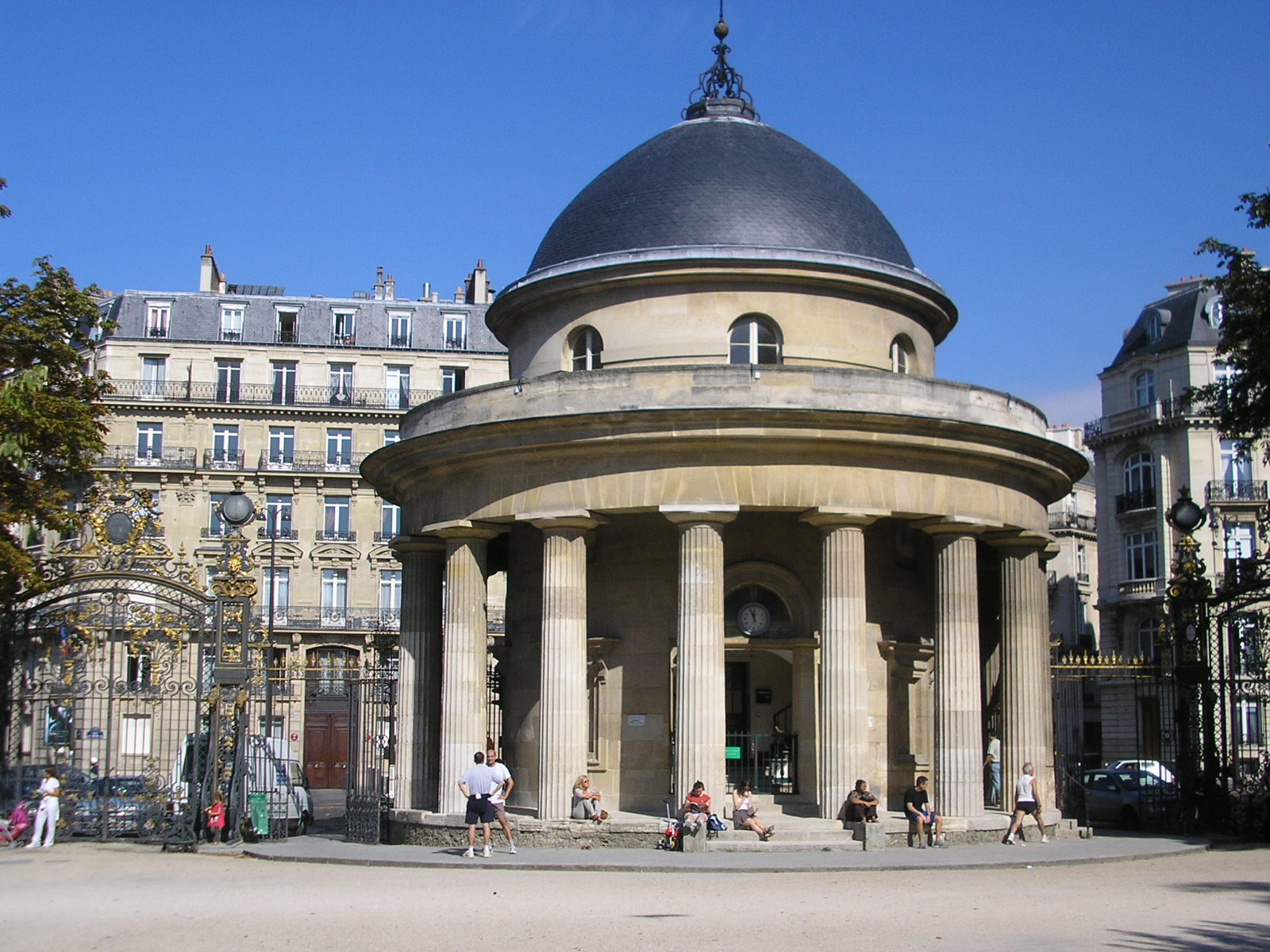 Barrière de Chartres